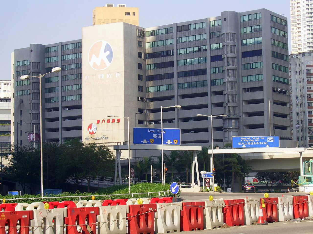 中文（香港）: 新九龍廣場